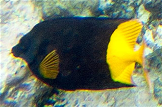 Siganus uspi, Wakaya, Fiyi